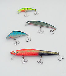 beita artifiziala